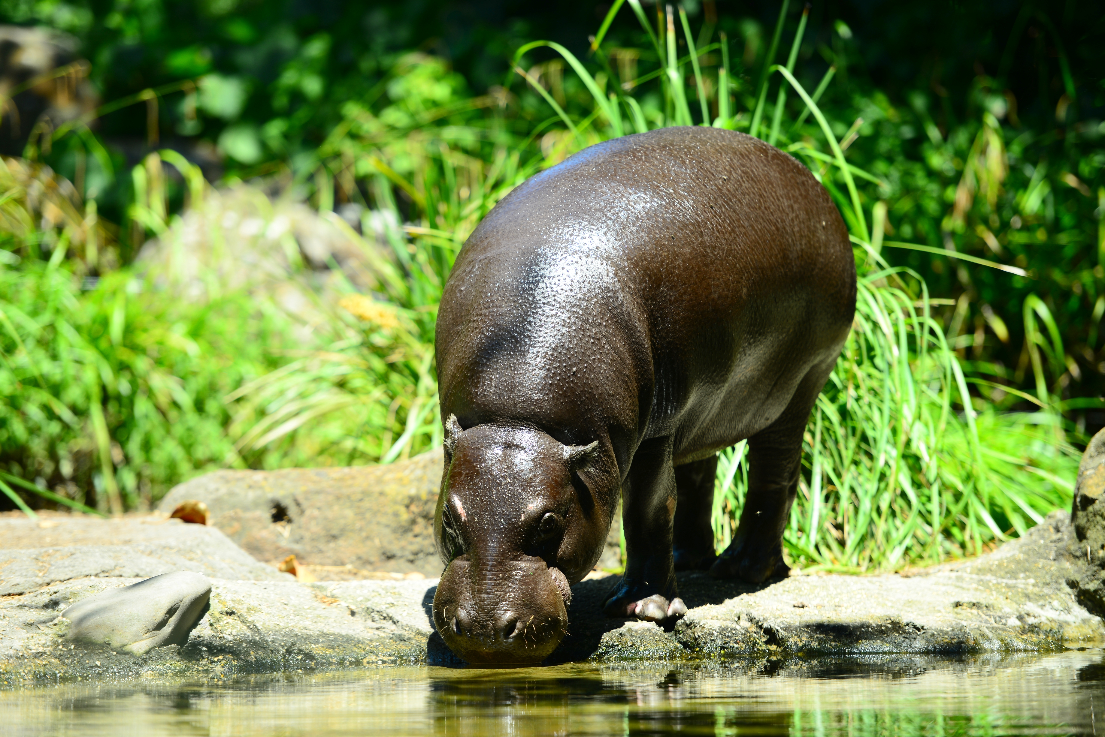 Melbourne Zoo